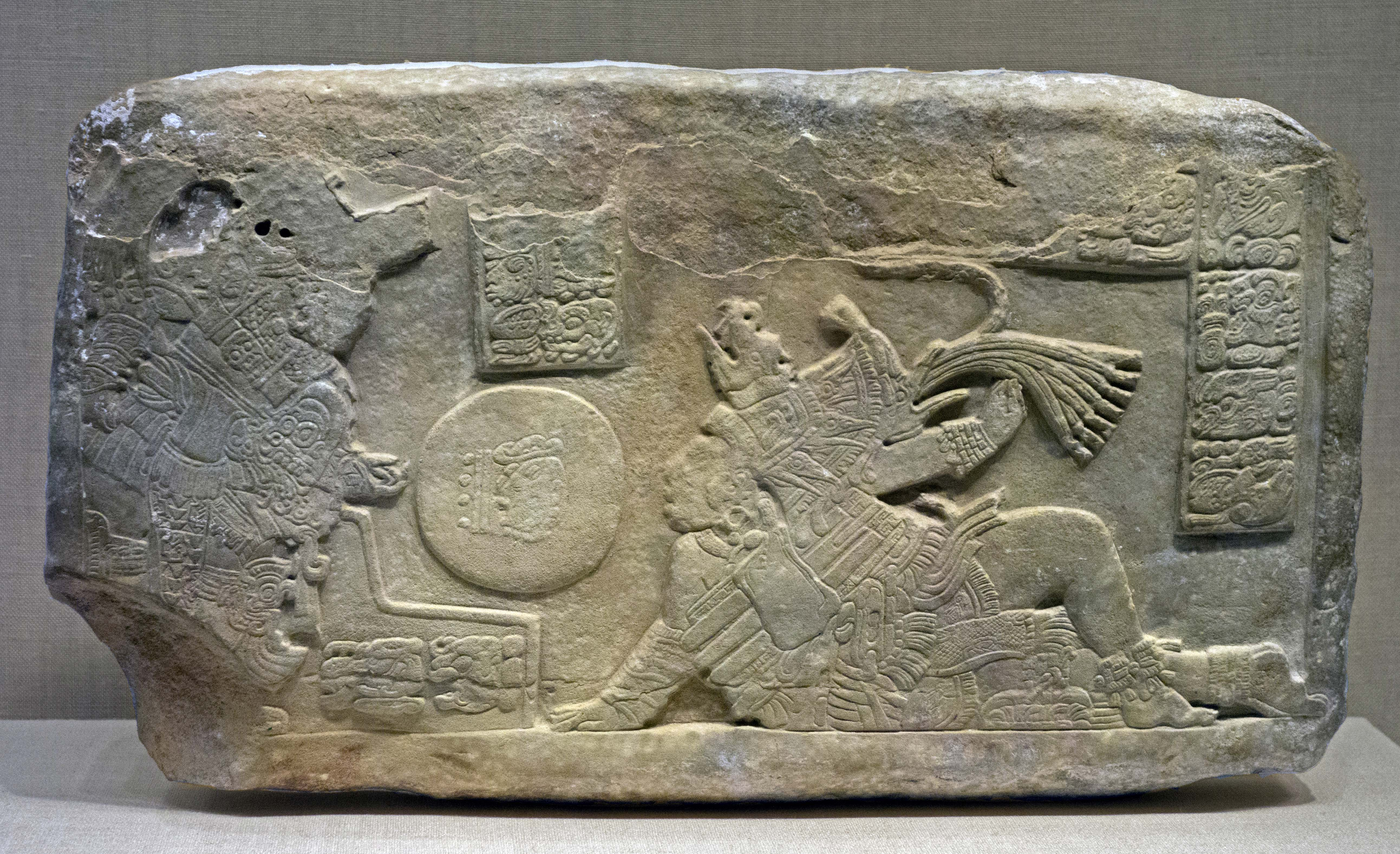 Relieve de La Corona que muestra una escena del Juego de pelota de Mesoamérica.